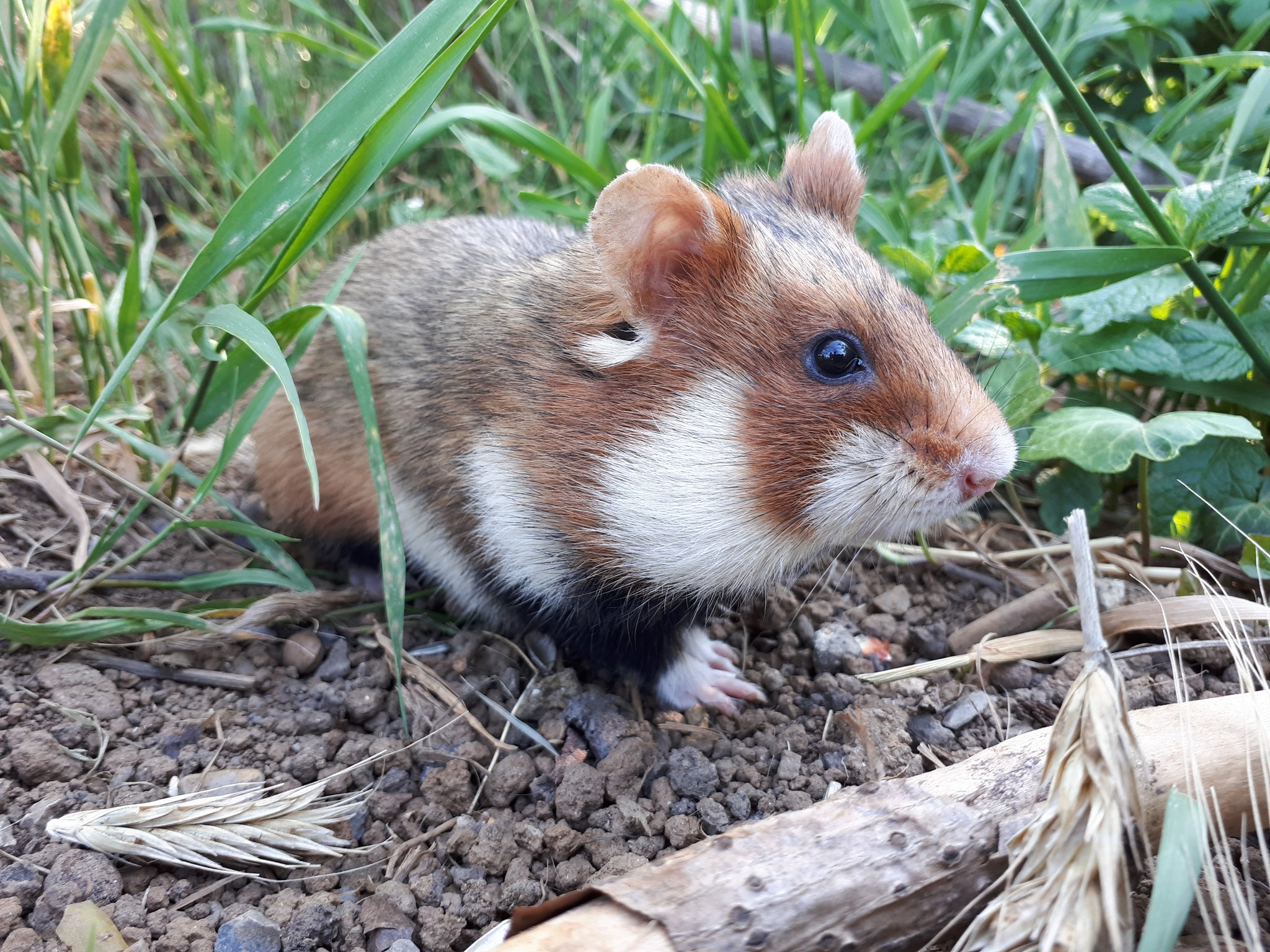 Cricetus cricetus - Feldhamster - 1120 Wien